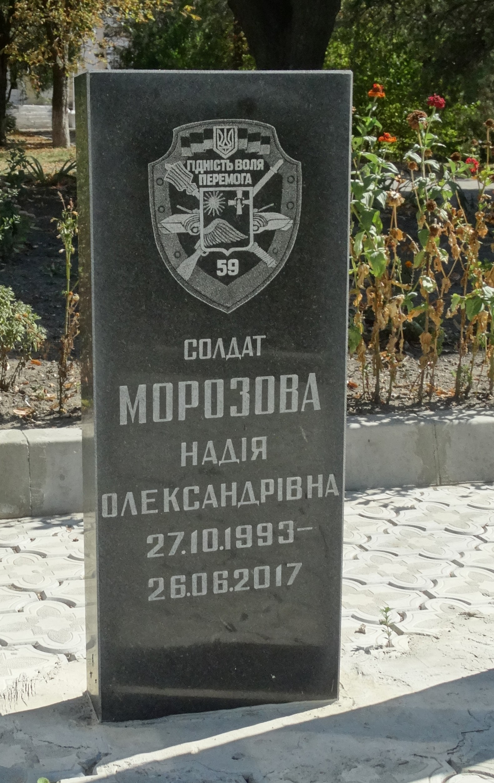 Вікіекспедиція на північ Одещини